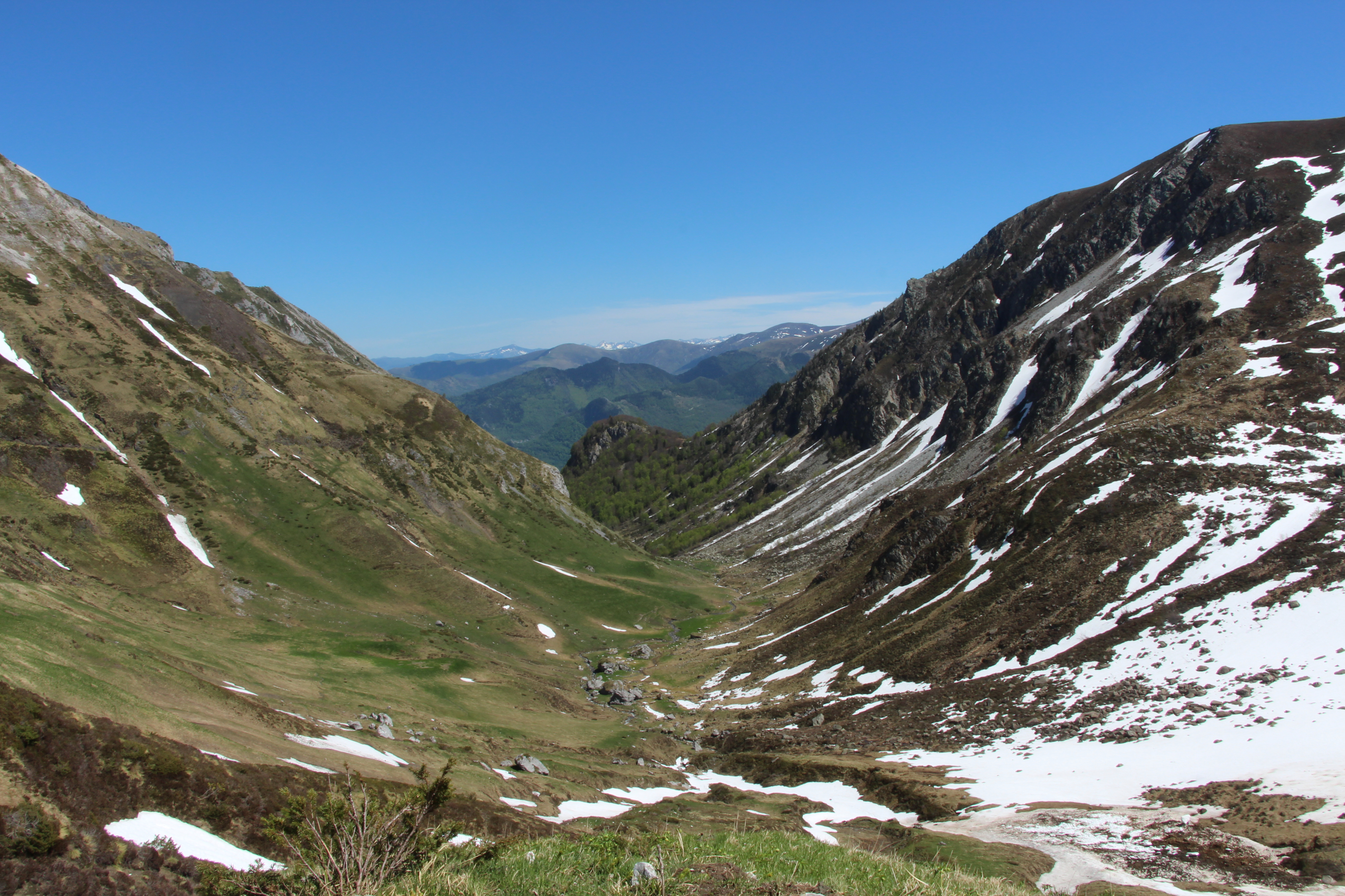 Parc Naturel Régional des Pyrénées ariégeoises